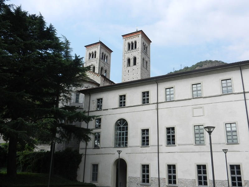 Como - Abside della Basilica di S. Abbondio